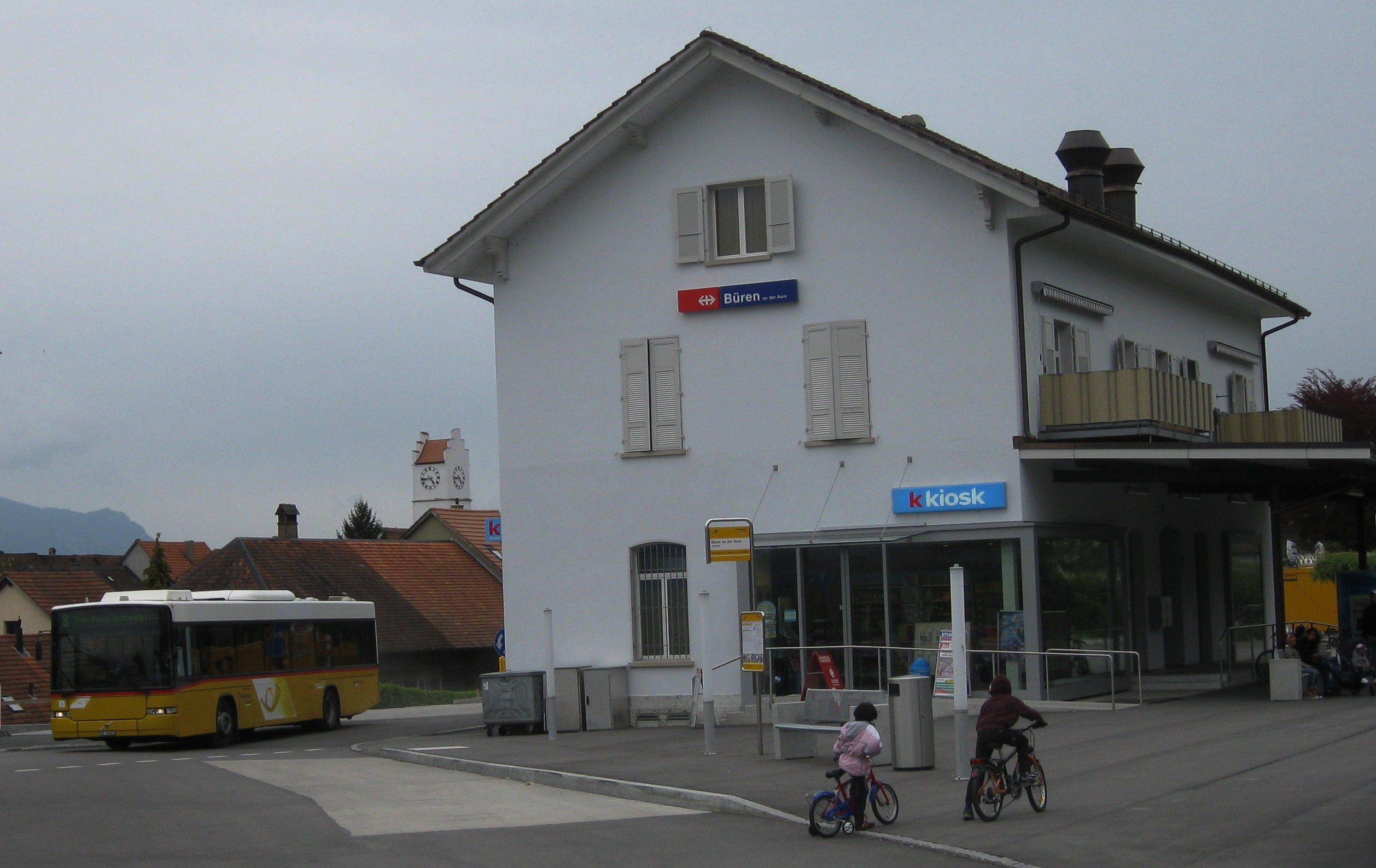 Neuer Bahnhof Büren an der Aare